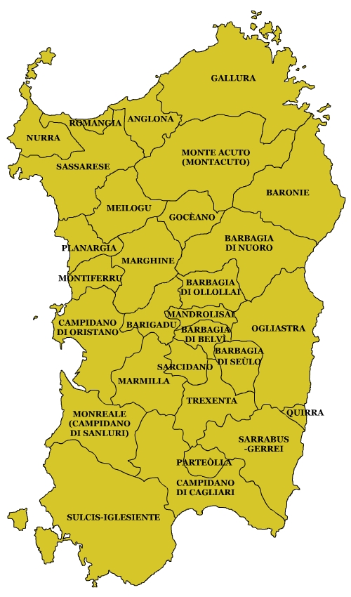 Sardinian Subregions